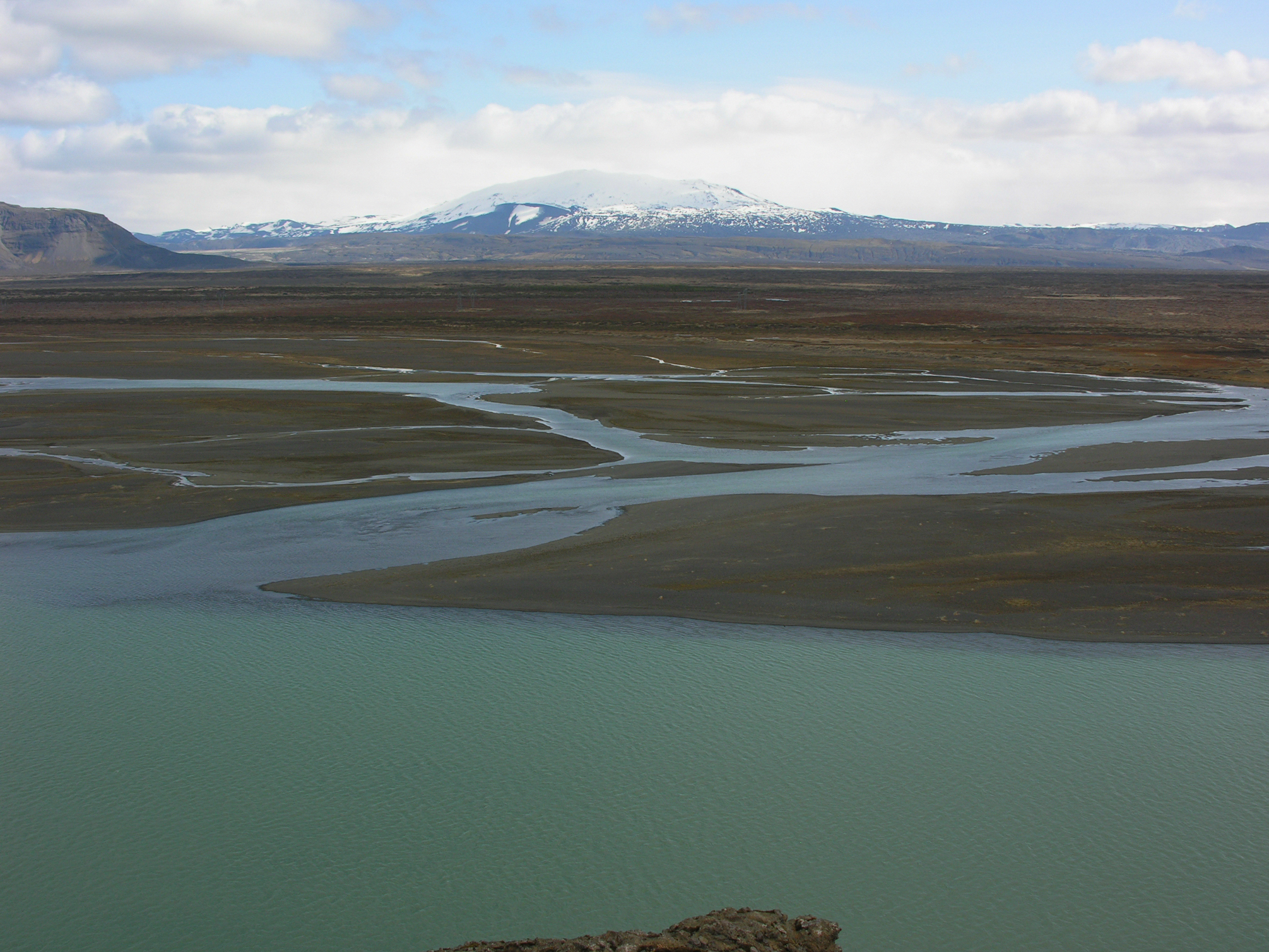 Iceland, Þjórsá and Hekla